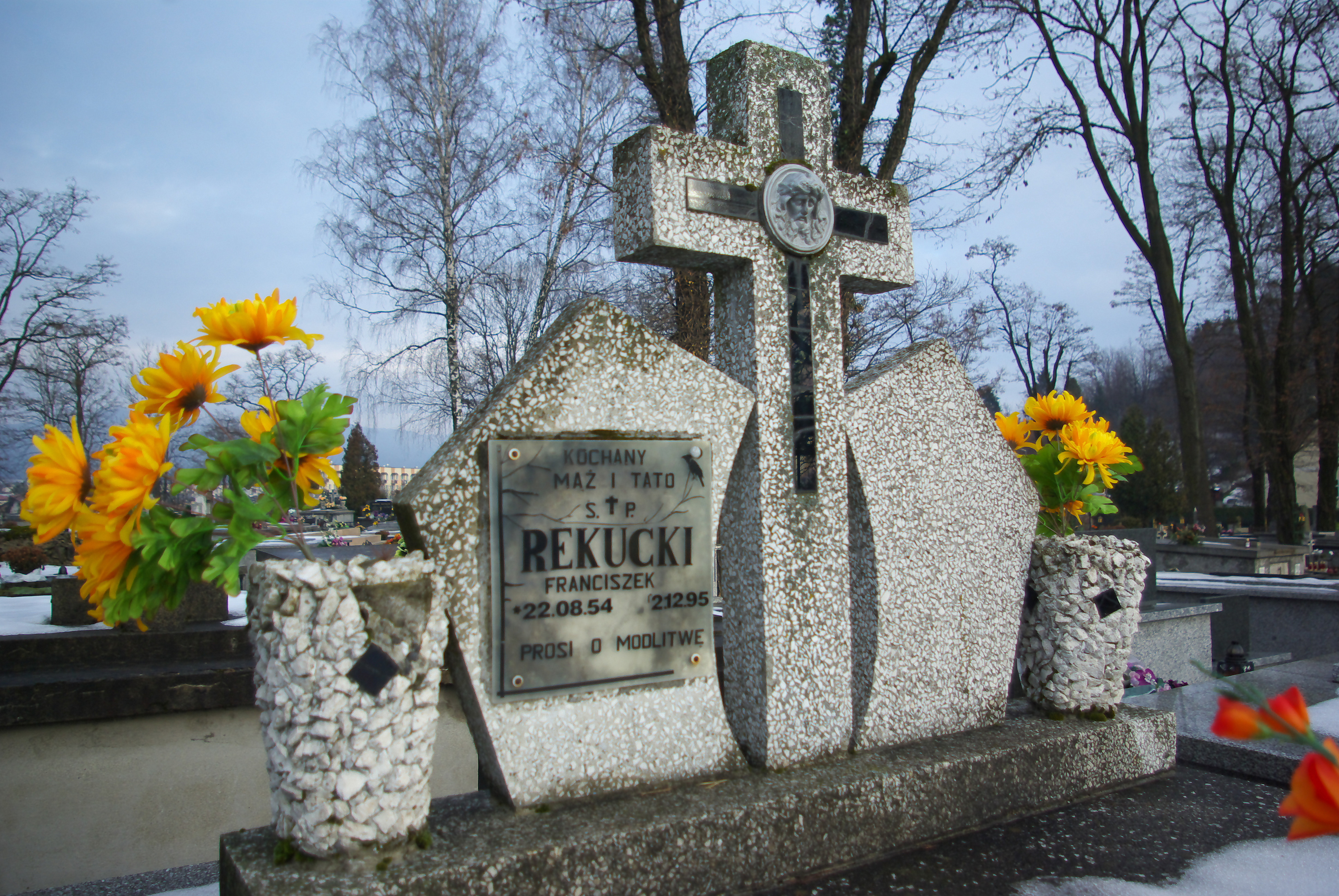 Miejsce spoczynku hokeisty Franciszka Rekuckiego, w grobowcu rodziny Truszkiewicz